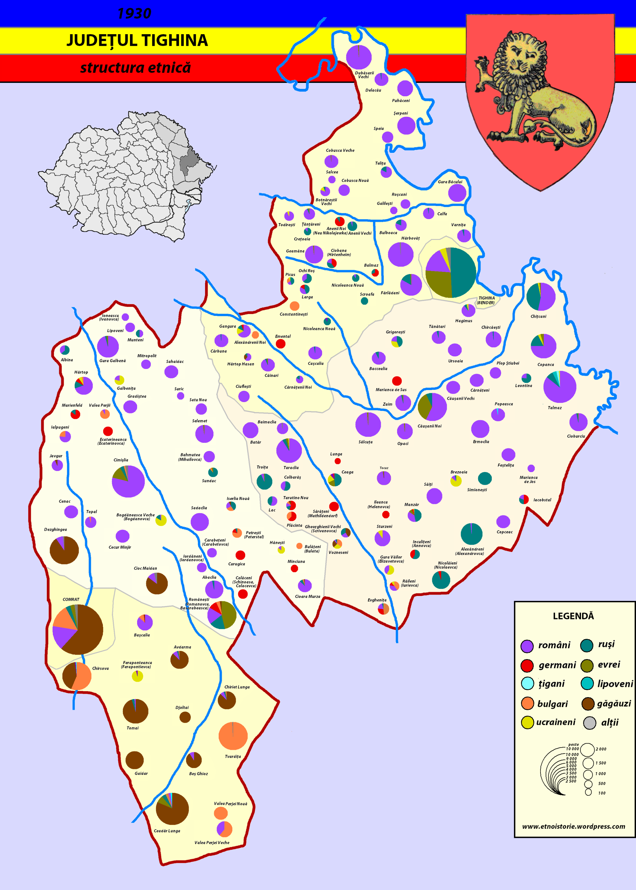 Structura etnică a judetului Tighina (1930)